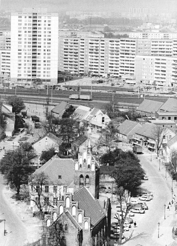 ADN-ZB-Reiche-13.4.89-Berlin: Wahlbilanz Marzahn - Eine winzige dörfliche Oase im neuen Häusermeer ist das Dorf Marzahn. Vor mehr als zehn Jahren gab es dem neuentstehenden Stadtbezirk Berlin-Marzahn seinen Namen. Seit einiger Zeit ist es selbst Schauplatz des Baugeschehens geworden und entsteht nach altem märkischem Vorbild neu. Eine Buchdruckerei, eine Silberschmiede und eine mechanische Werkstatt öffneten in den vergangenen Monaten. -Siehe auch 1989-0413-32N und 33N. Nächste Aufgabe ist die Neugestaltung des Dorfangers. Ein Domizil im Dorf finden auch ein Museumsgehöft, ein nach historischem Vorbild gestaltetes Postamt, eine Glaserei und eine Stukkateur-Werkstatt. Information added by Wikimedia users.Das Foto wurde vom Hochhaus Allee der Kosmonauten Nr.200 in Blickrichtung Westen aufgenommen.